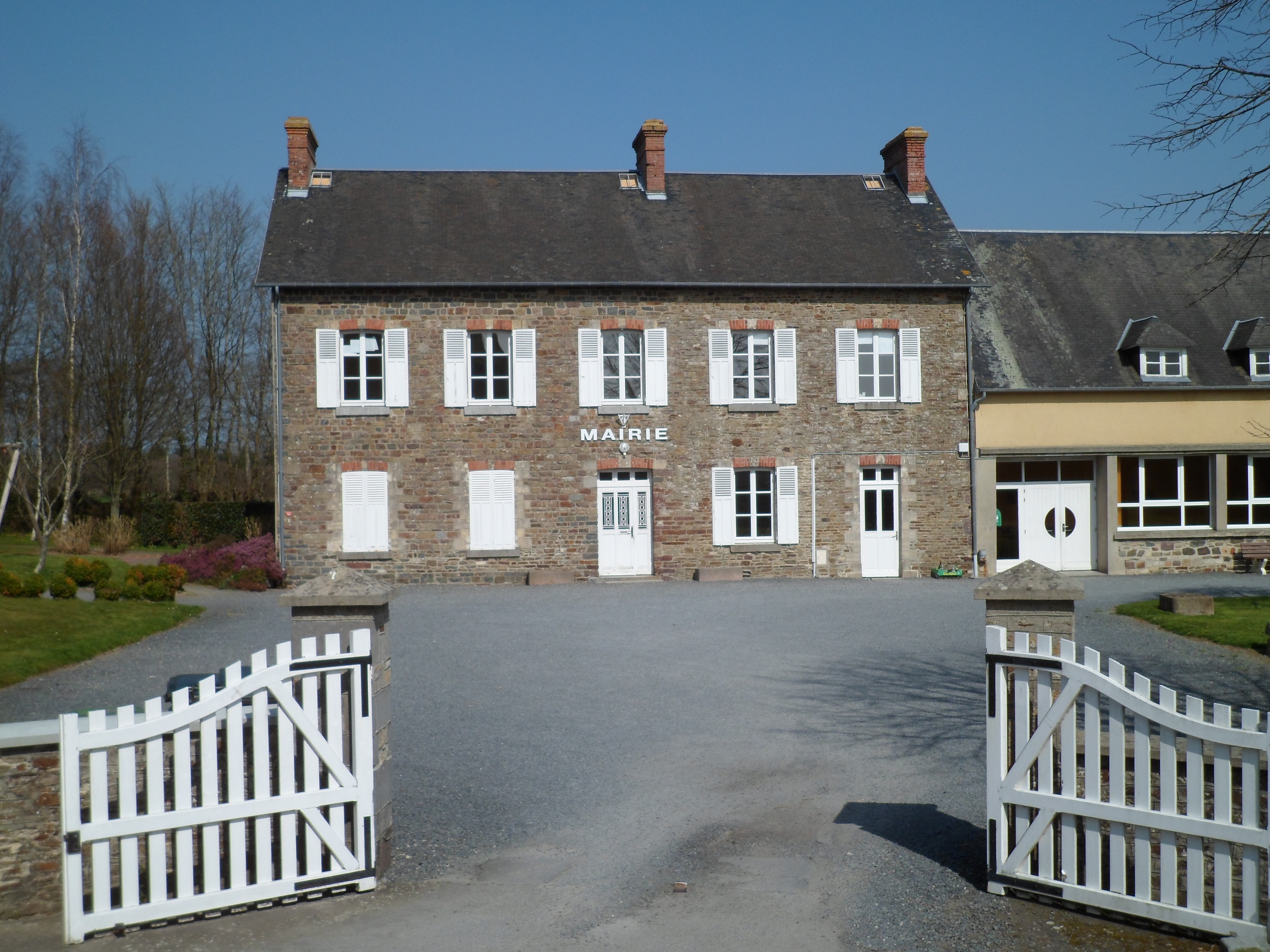 Église Saint-Martin de Saint-Martin-de-Bonfossé